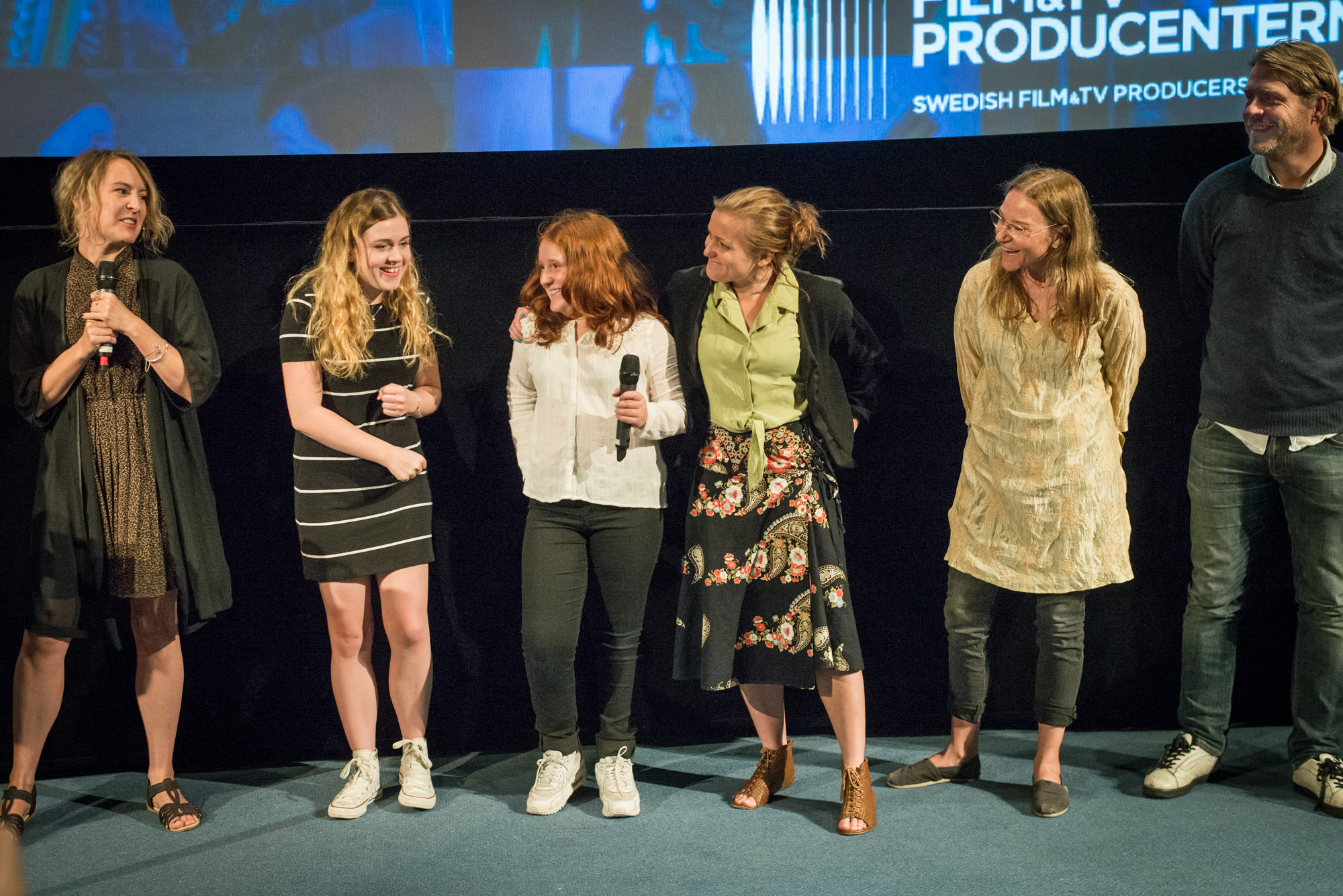 Gänget bakom filmen Min lilla syster under presentationen i Filmhuset i Stockholm den 17 augusti 2015.